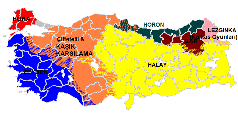 kişisel